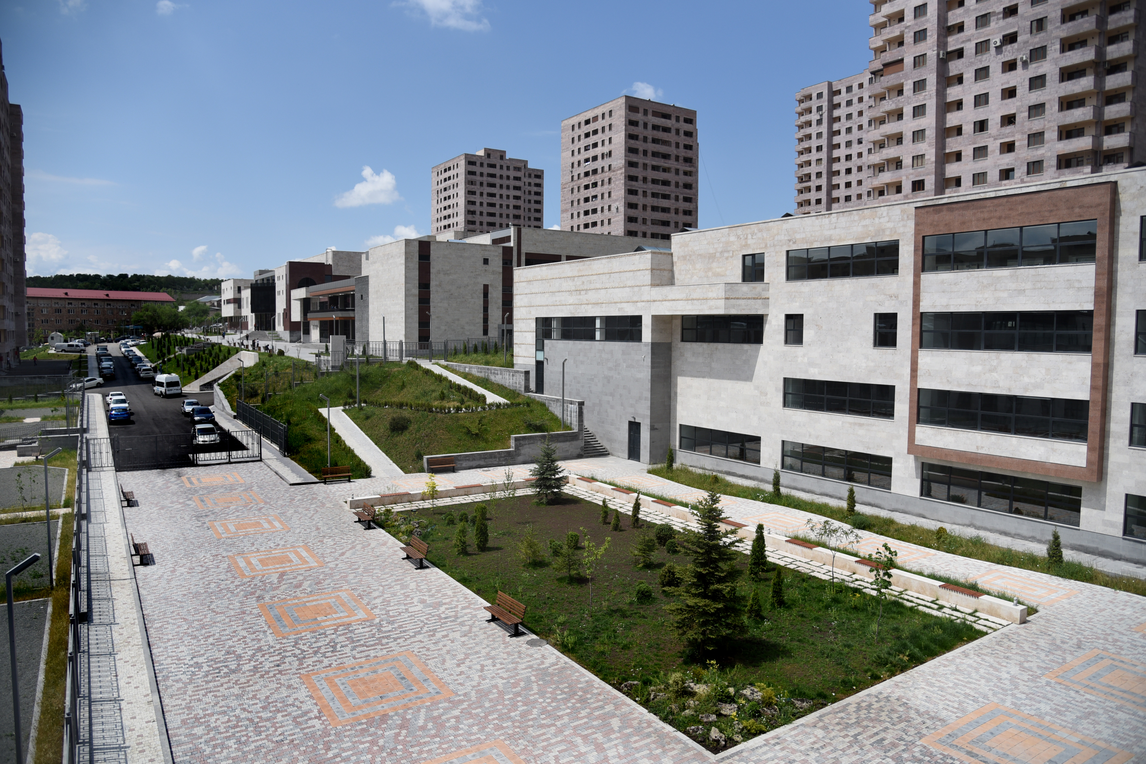 Учебно-спортивный комплекс ЗАО «Газпром Армения»